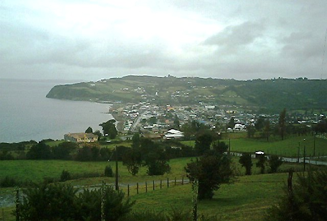 Vista de Achao, capital de la comuna de Quinchao (Chile), desde el Alto de La Paloma.